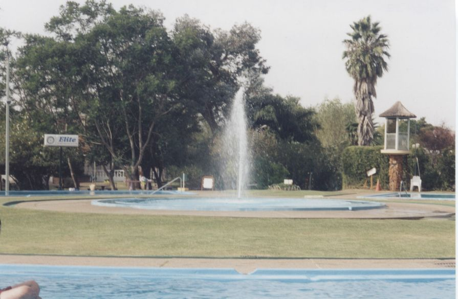 Foto de las piscinas municipales de las Termas del Daymán, Salto, Uruguay.